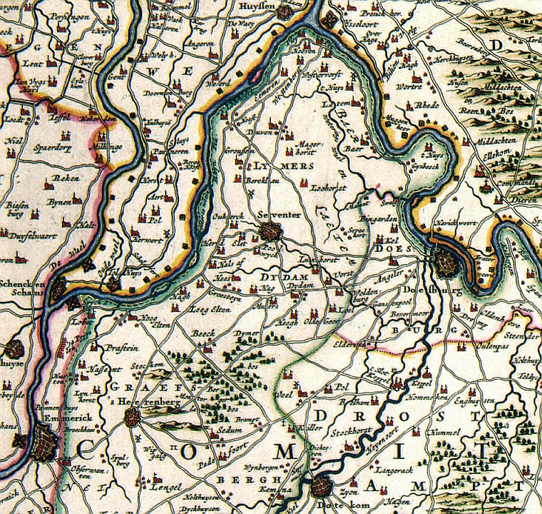 Ausschnitt Didam (damals DYDAM)